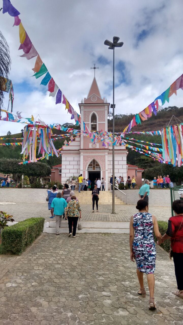 Foto: Larissa Tononi.